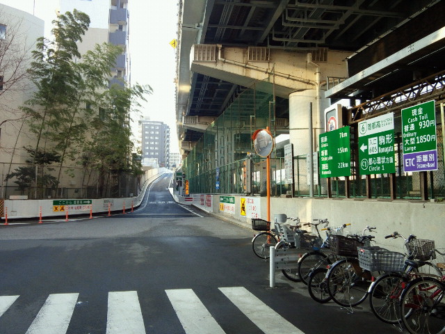 首都高速道路6号向島線駒形入口（一般道との接続部を撮影）